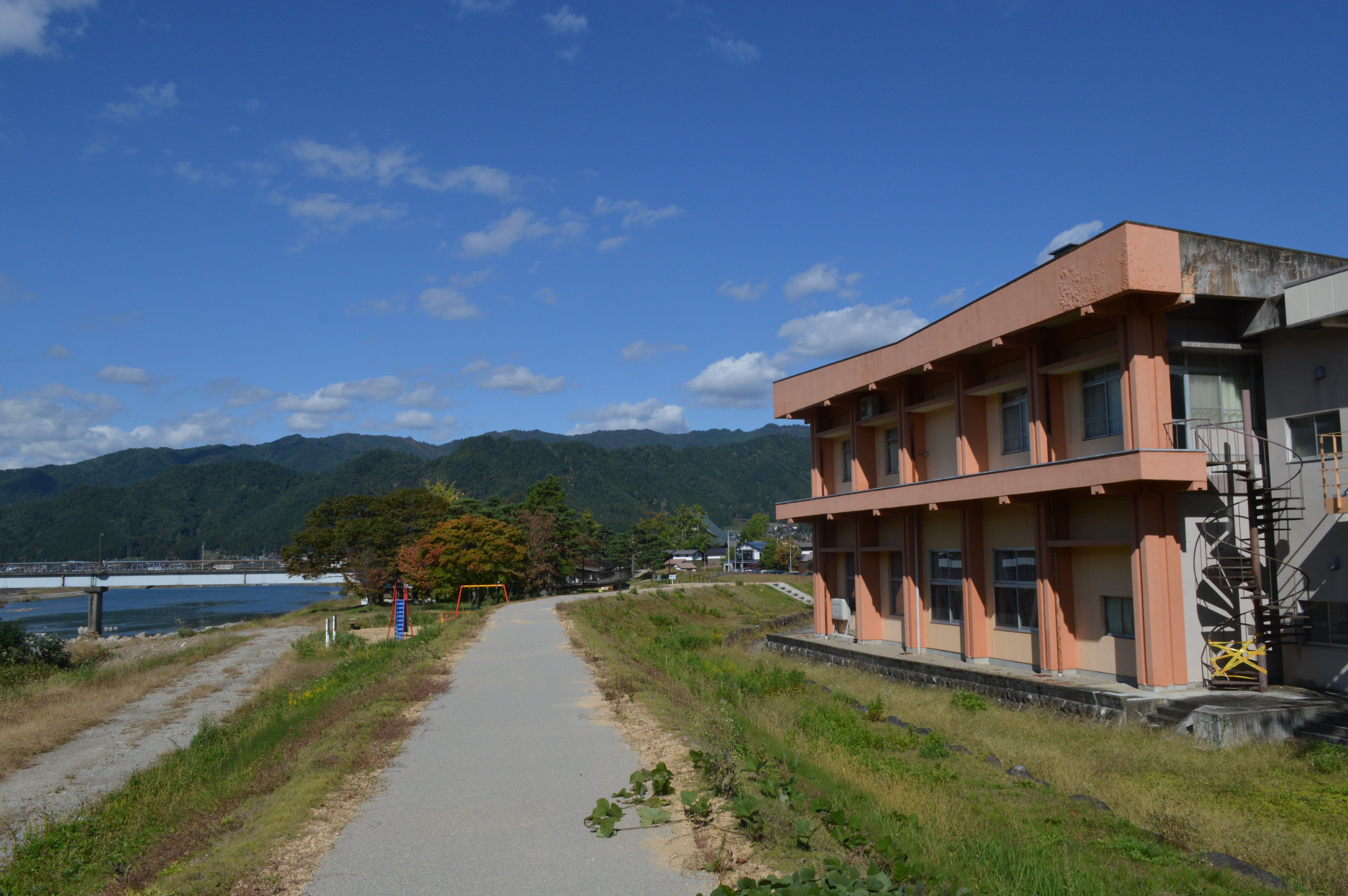 岐阜県飛騨市の千代の松原公民館（右）。左端は宮川。かつては古川町公民館図書室/古川町立図書館（現・飛騨市図書館）として使用されていた。